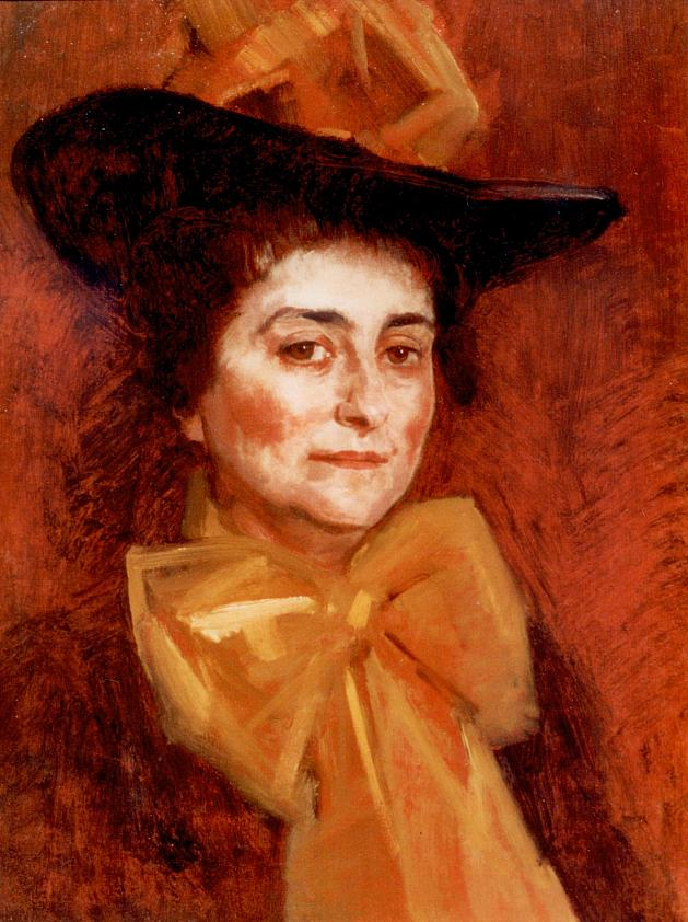 Zelfportret van Anna Gildemeester